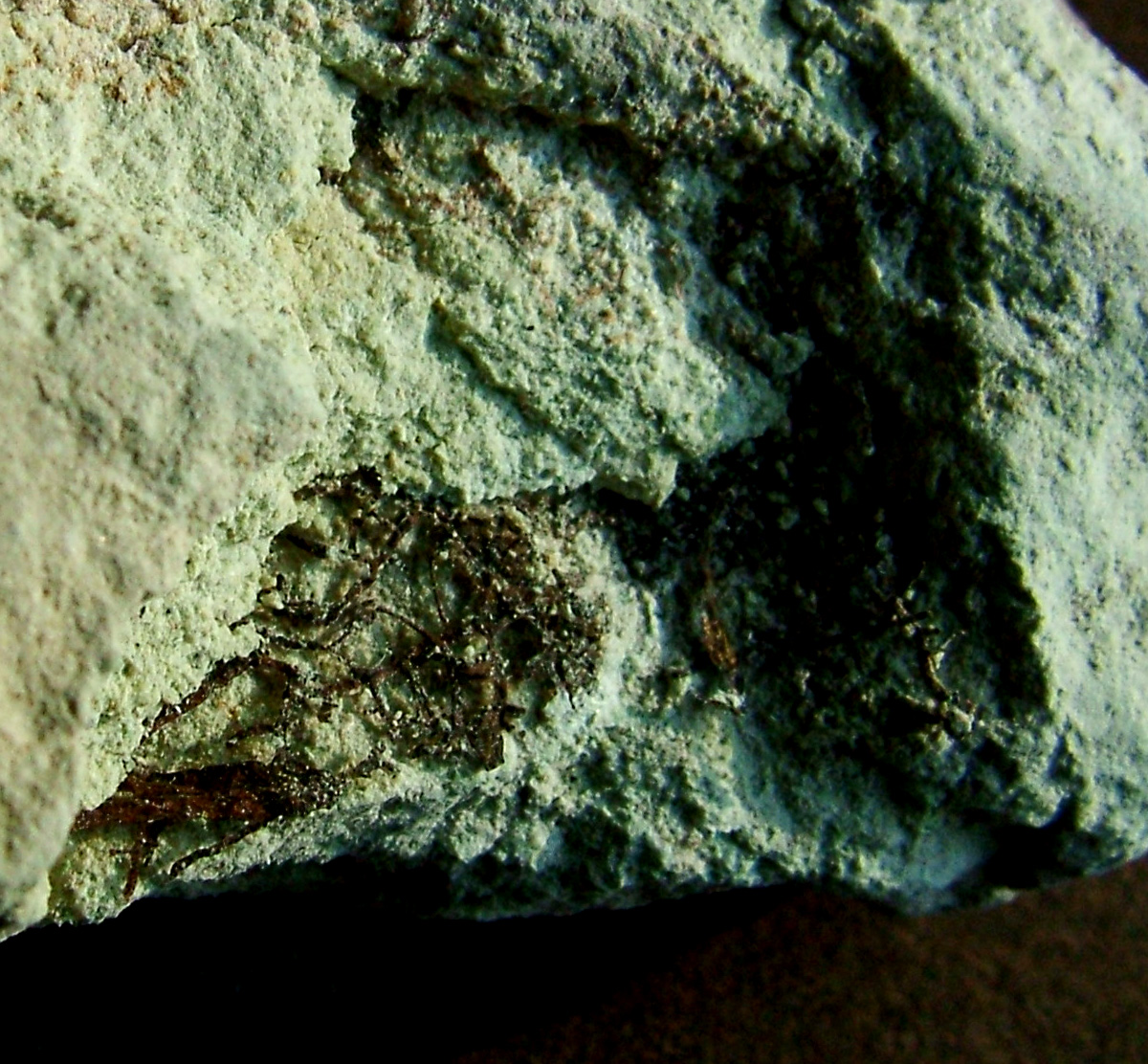 Kőzetminta a felsőörsi geológiai bemutatóhelyről